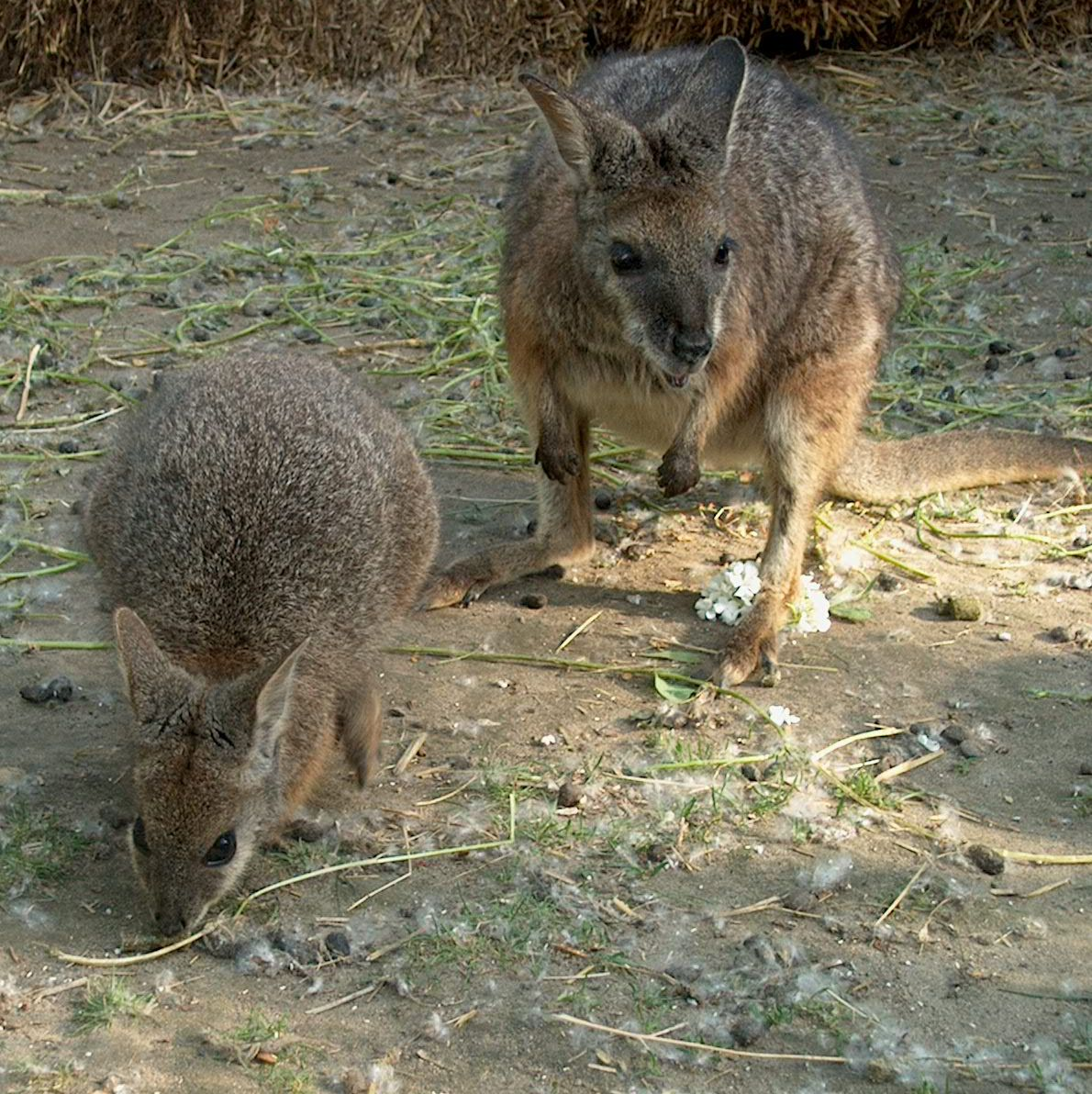 Macropus eugenii in Budapest Zoo